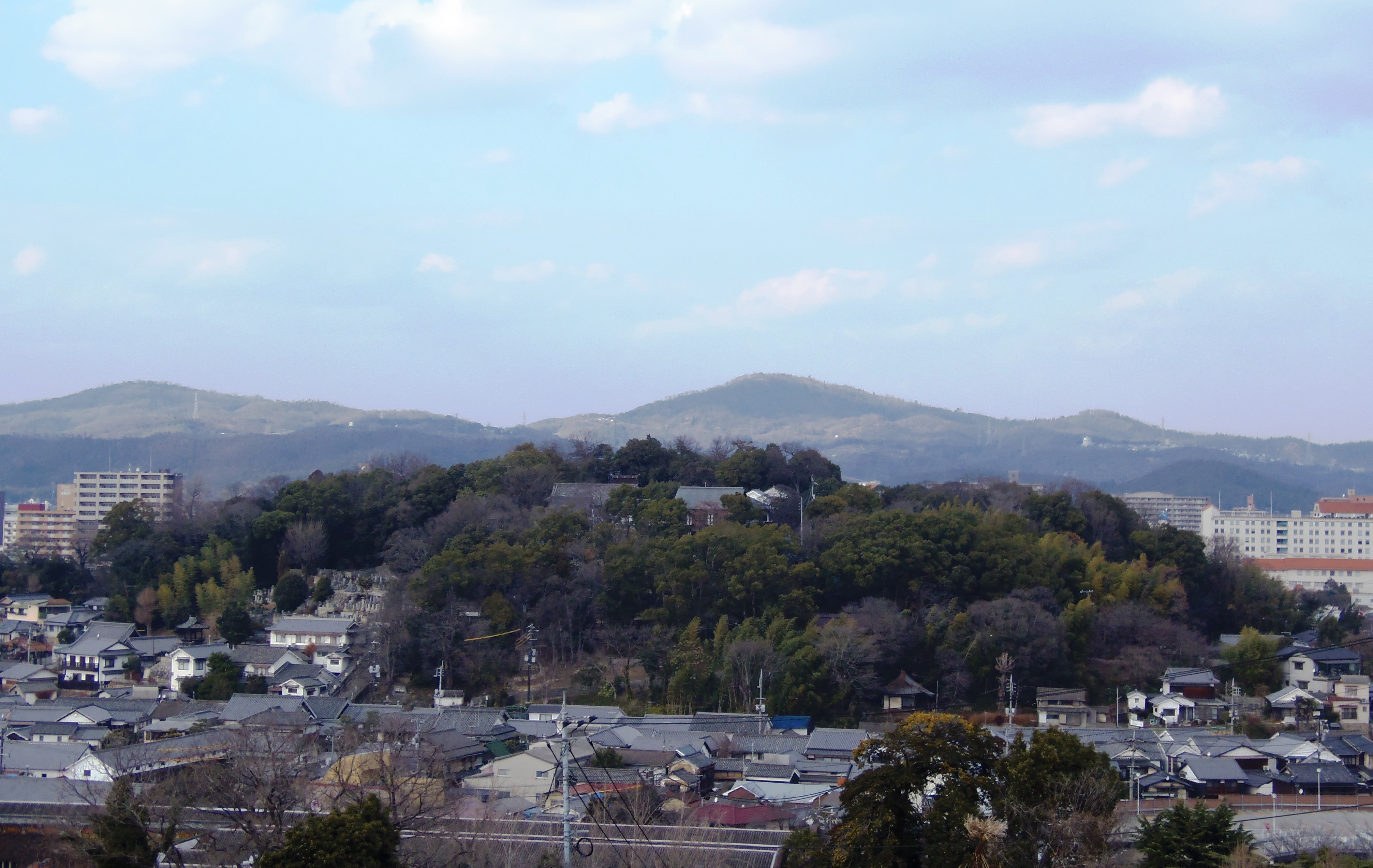 倉敷市の鶴形山です。